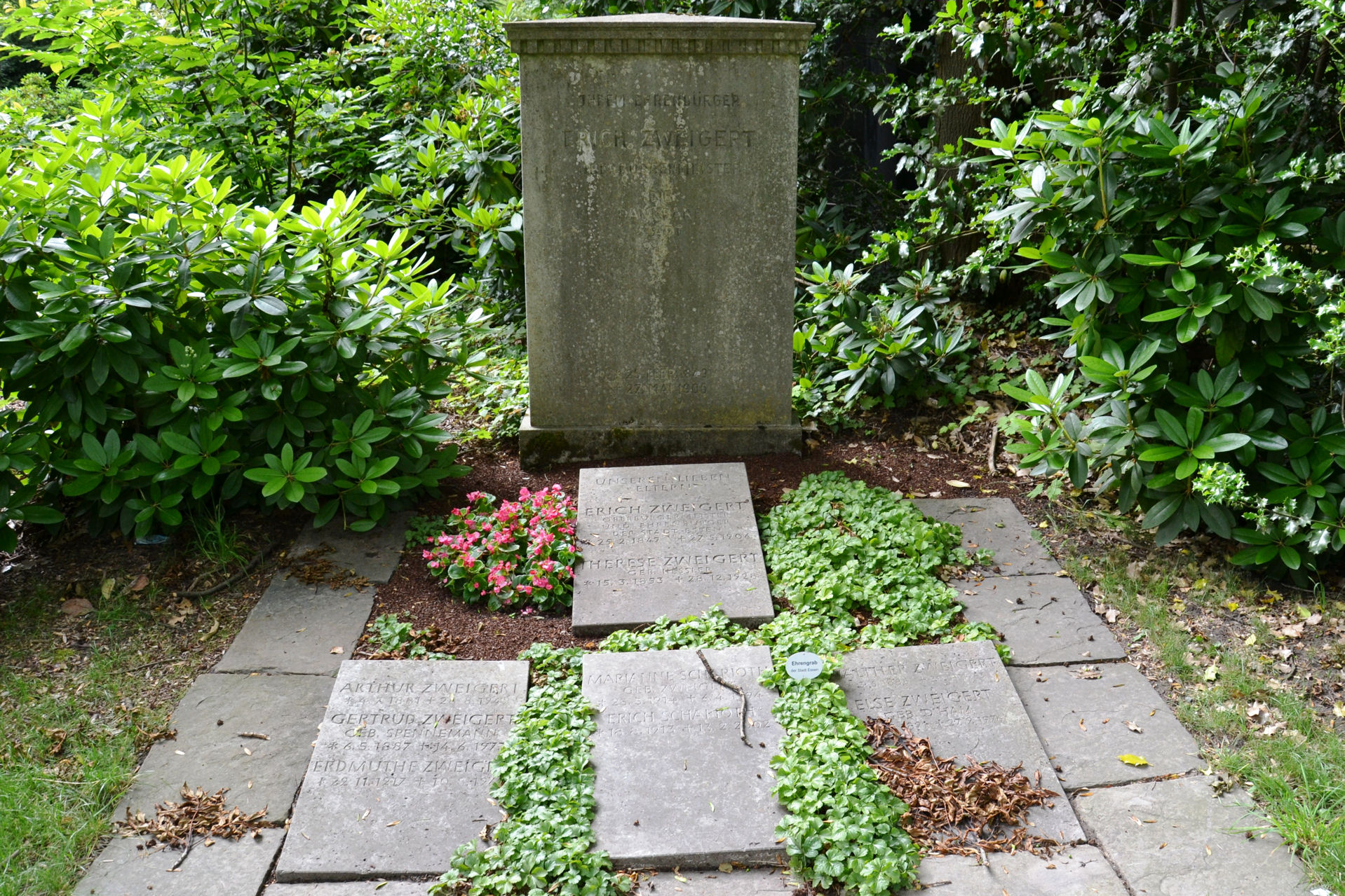 Erich Zweigert, deutscher Jurist und Politiker - Ehrengrab der Stadt Essen auf dem Ostfriedhof